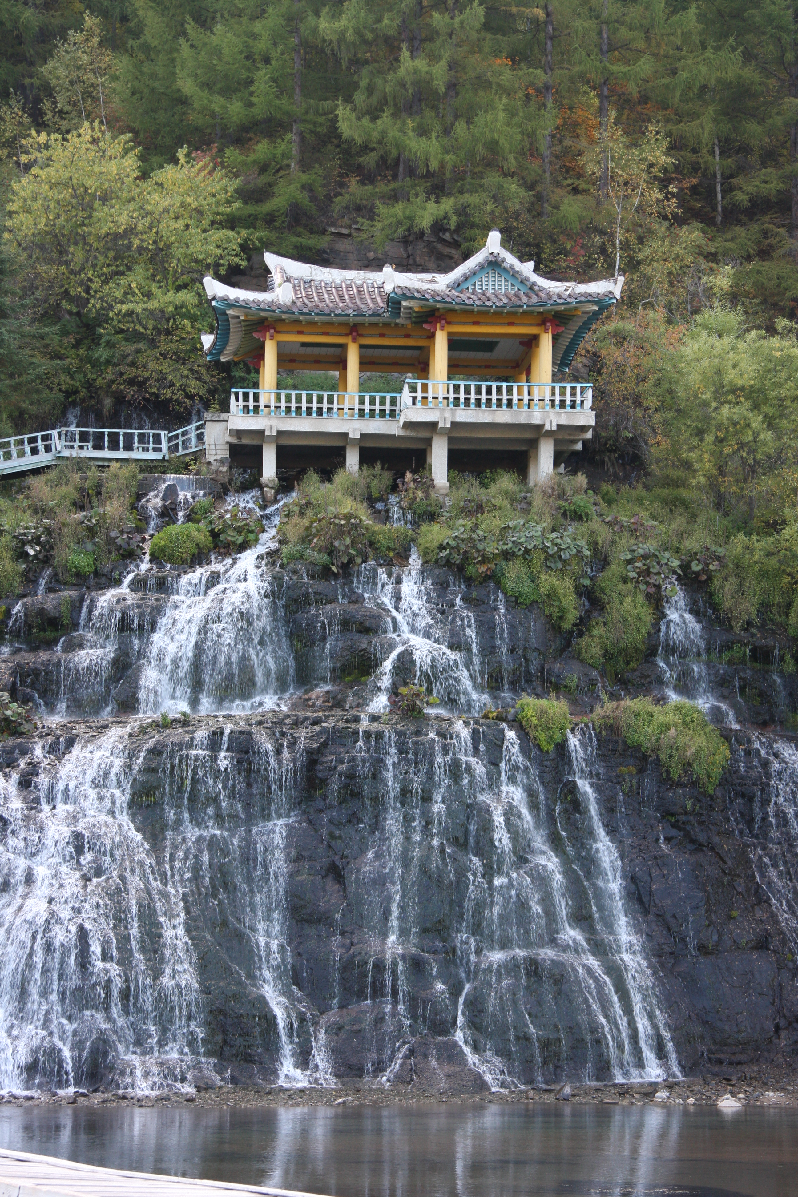 Rimyongsu Falls